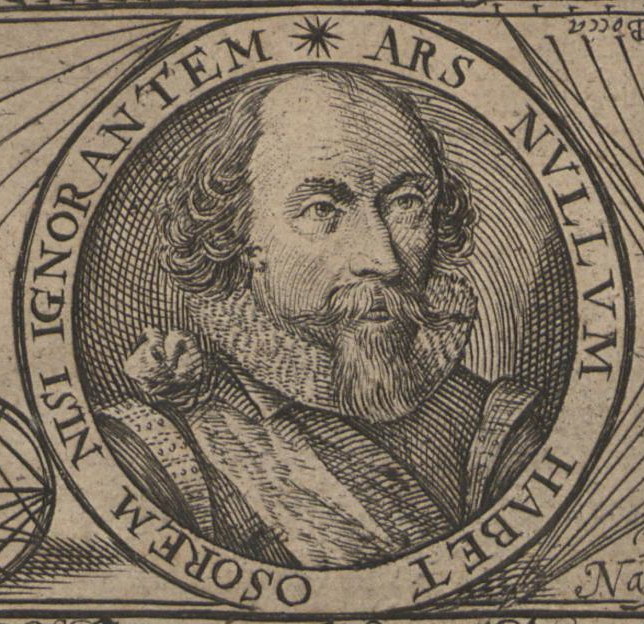 Bildnis des Hans Guhle. Titelblatt aus Hans Guhle: BuchsenmeistereyBuch: In Zwey Theil unterschieden; Der Erste Theil handelt von Italia wie daselbsten das grosse Geschütz auff allerhand manier gegossen und zur proba wird beschossen; Der ander Theil handelt von Germania. Heinrich Carstens, Hamburg 1618